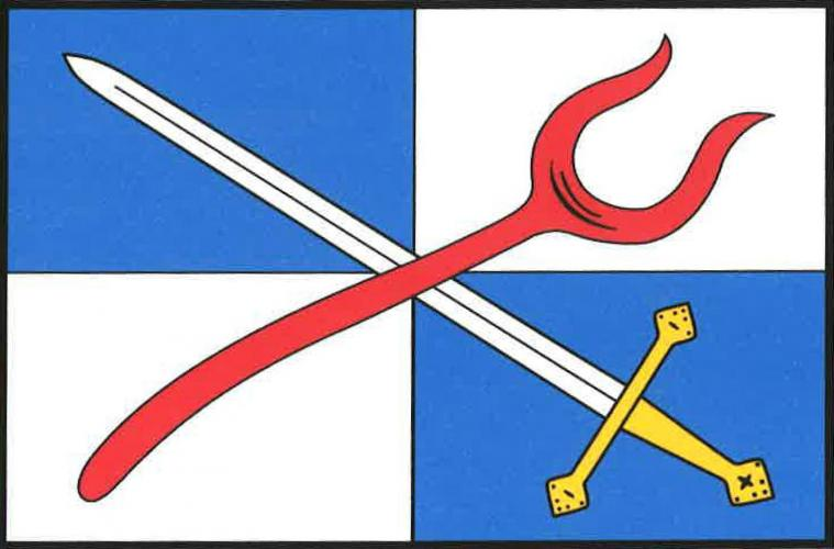 vlajka, Božejov, okres Pelhřimov